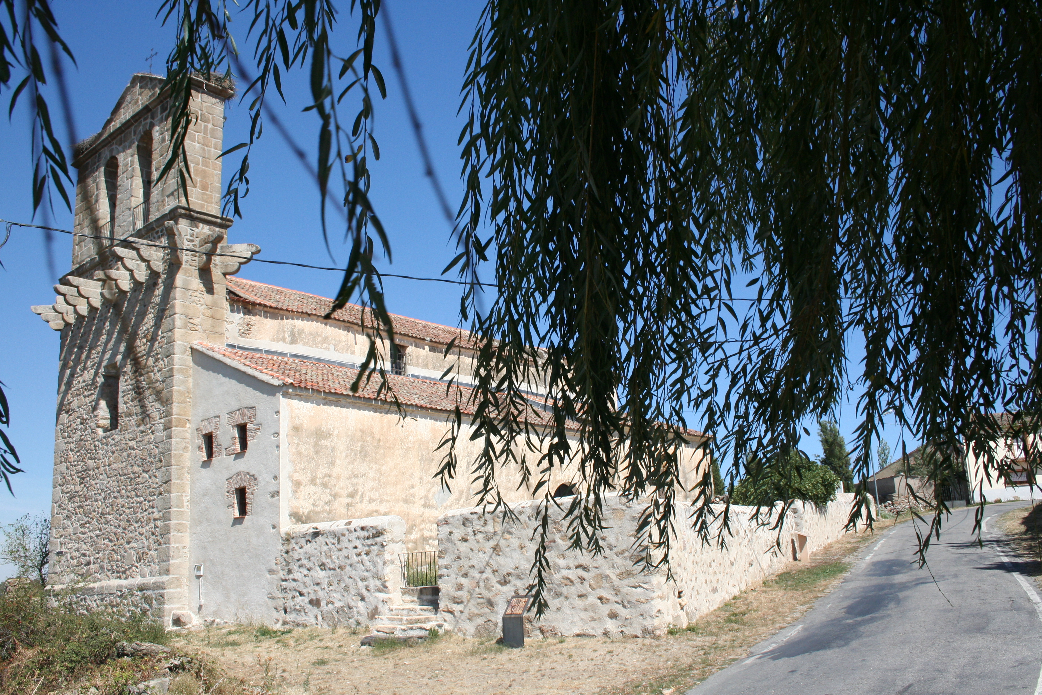 Iglesia de Santo Domingo (Santo Domingo de Pirón, Segovia, España)